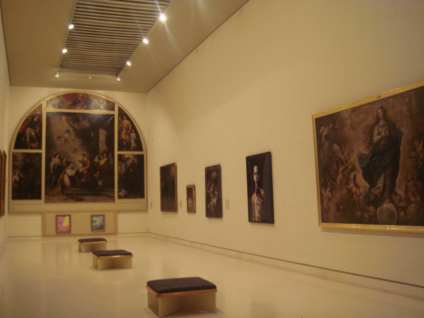 Sala del barroco español (Murillo) del Museo de Cádiz.